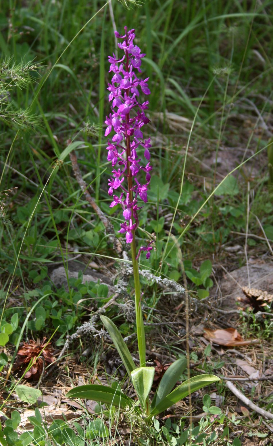 Orchis mascula subsp. pinetorum, Orchideen (Orchidaceae) - Türkei/Türkiye/Turkey: Prov. Bolu/Bolu ili, Köroğlu Dağları, 19-20 km S Bolu, an der Straße nach Kıbrıscık, 1450-1500 m